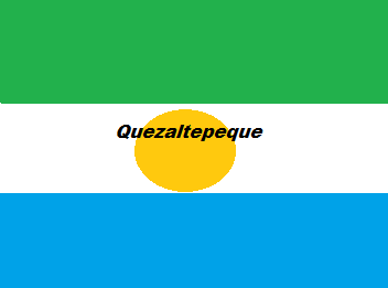 Bandera de Quezaltepeque El Salvador